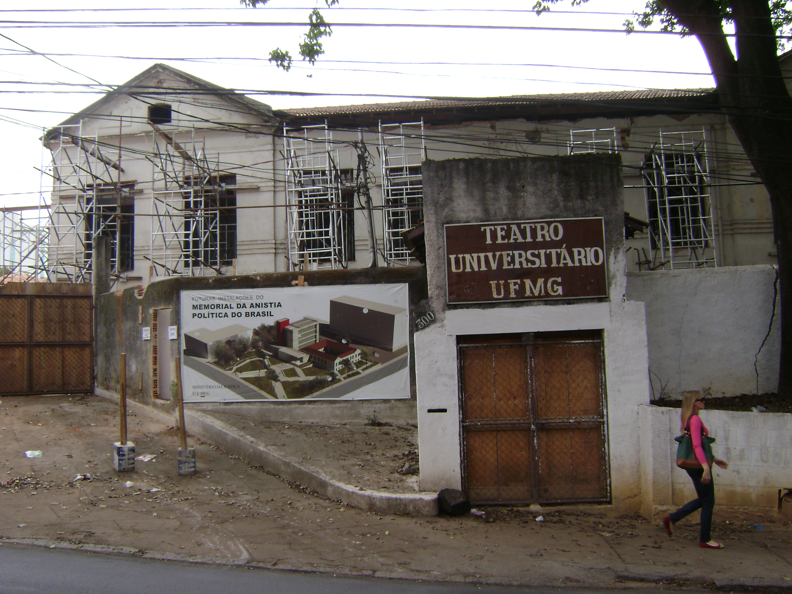 Memorial da Anistia Política do Brasil, na rua Carangola.